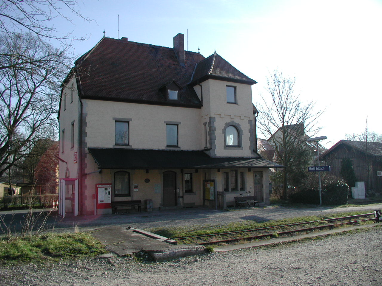 Train station Markt Erlbach Bahnhof Markt Erlbach